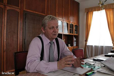 Tarlós István interjú közben 2010 októberében.